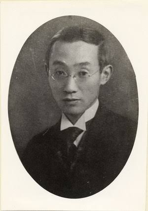 澤木四方吉肖像写真